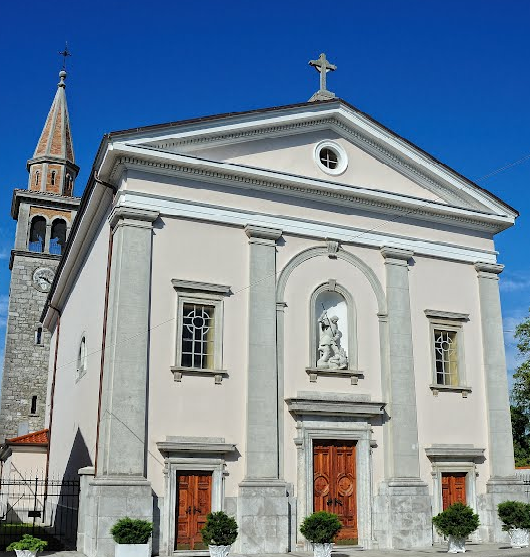 cerkev sv. Jurija, Miren.